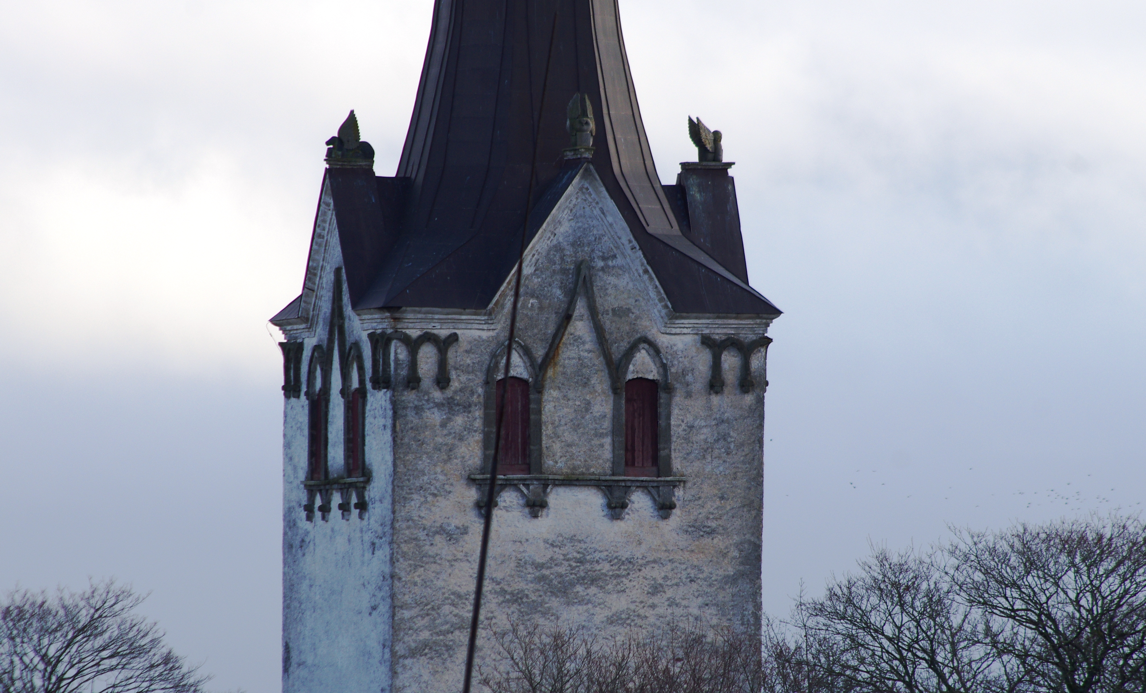 Keila kirik